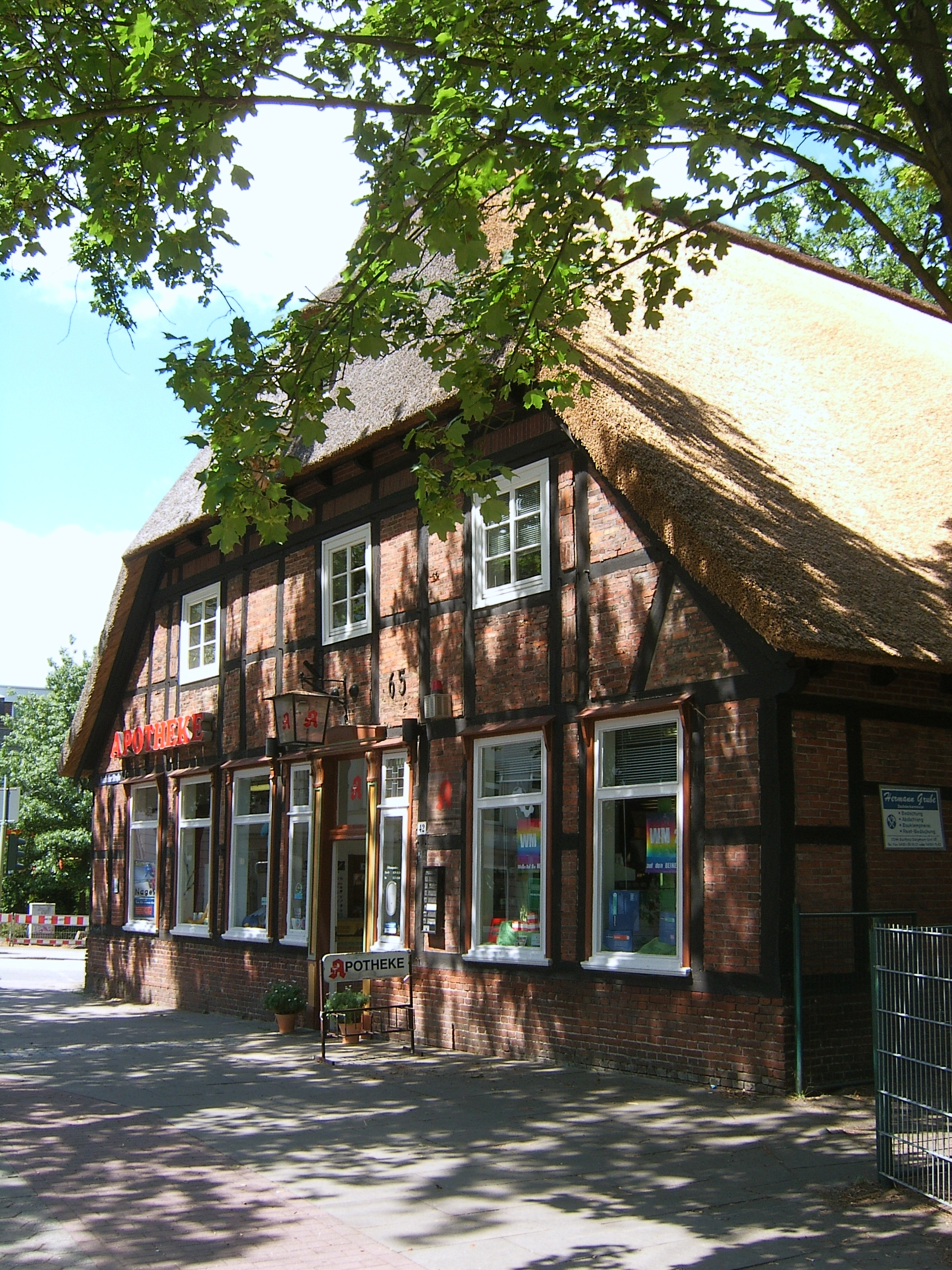 Heimfelder Str. 42 in Hamburg, Stadtteil Heimfeld, Bezirk Harburg. Vermutlich ältester Bau in Heimfeld in Fachwerk mit Reetdach auf dem Grundstück des 1784 aufgelösten Vorwerkes. Bauweise des Wohnwirtschaftsgebäudes lässt auf Bauzeit um 1815 schließen. Torbalken mit Inschrift "1765" verweist möglicherweise auf älterer Vorgängerbau, da bei Umbau 1960/61 älterer Gewölbekeller und Brandspuren unter der Diele entdeckt wurden. 1948/49 zum Wohngeschäftshaus umgebaut. Heute Apotheke im Niedersachsenhaus.